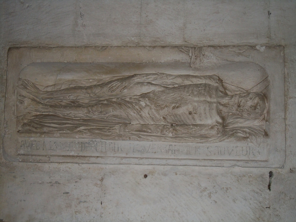 Inscription sous le transi : "Avec mes yeux de chair, je verrai mon sauveur"